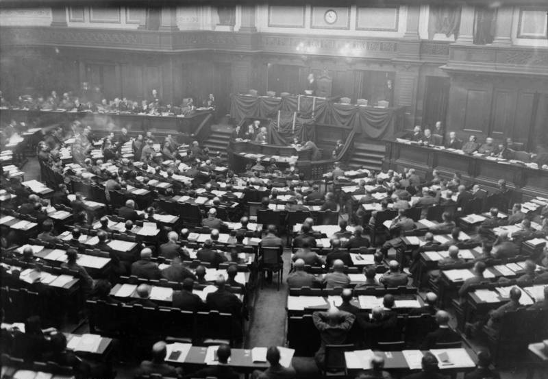 Die Reichsversammlung der A.&S. Räte Deutschlands am 16.Dez. im Abgeordnetenhause. Rich. Müller, Mitglied des Vollzugsausschusses eröffnet die Sitzung.